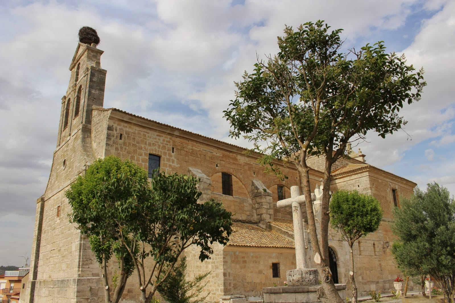 Ermita de Nuestra Señora de Revilla